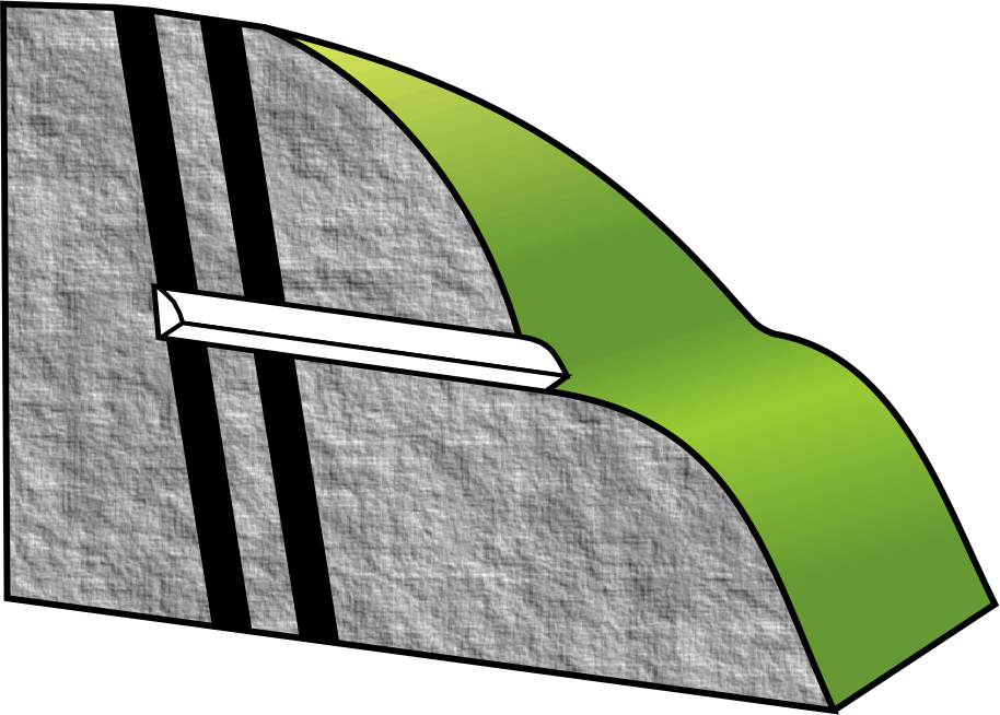 Вскрытие свиты пластов штольней